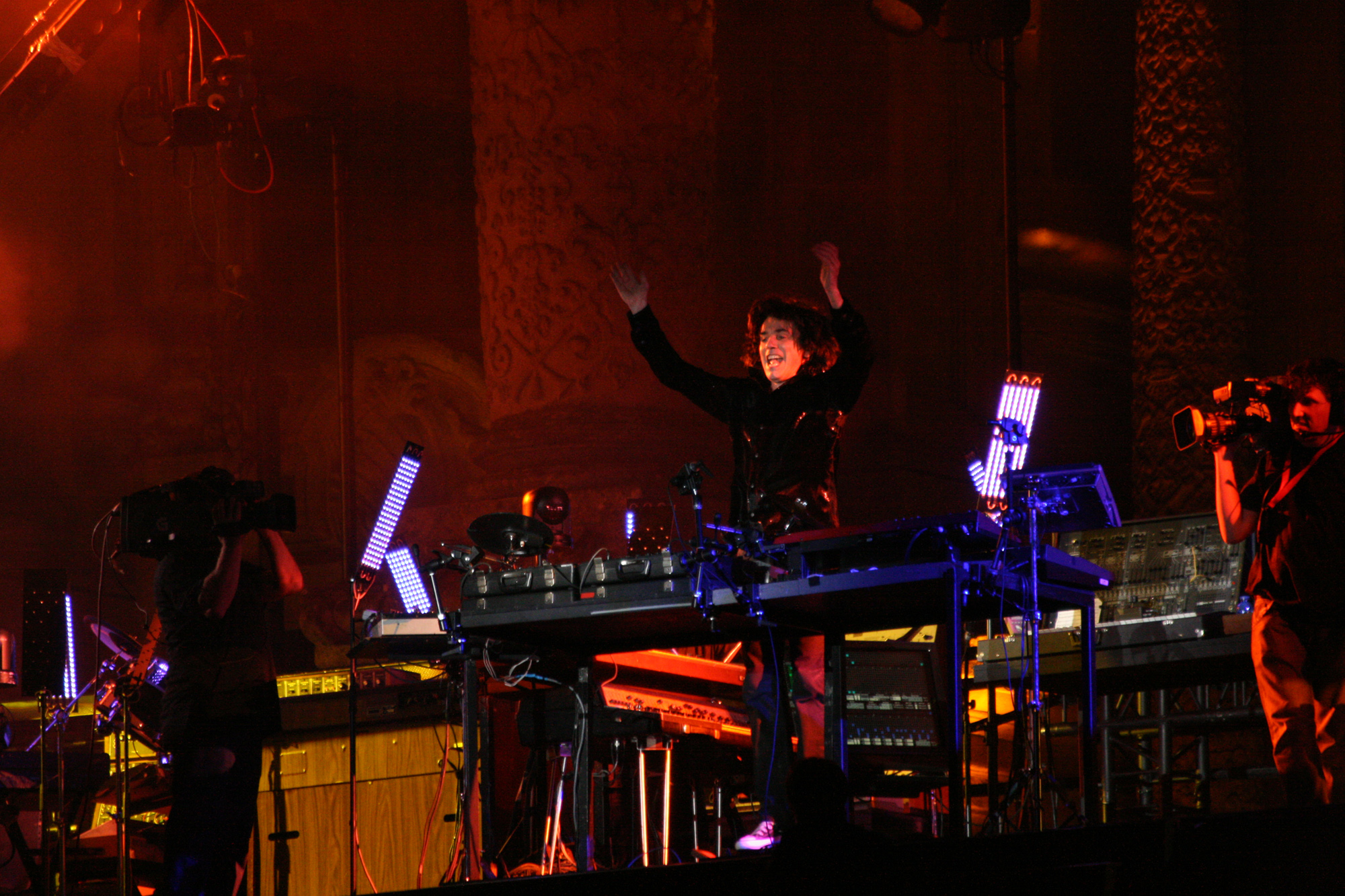 Concierto de Jean Michel Jarre en Santiago de Compostela (Galicia, España) el 31 de julio de 2010. Concert of Jean Michel Jarre Concert of Jean Michel Jarre in Santiago de Compostela (Galicia, Spain) on July 31th of 2010.